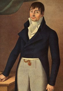 Josef Jiří Trassler (1759 - 1816), Moravský tiskař, vydavatel a knihkupec.